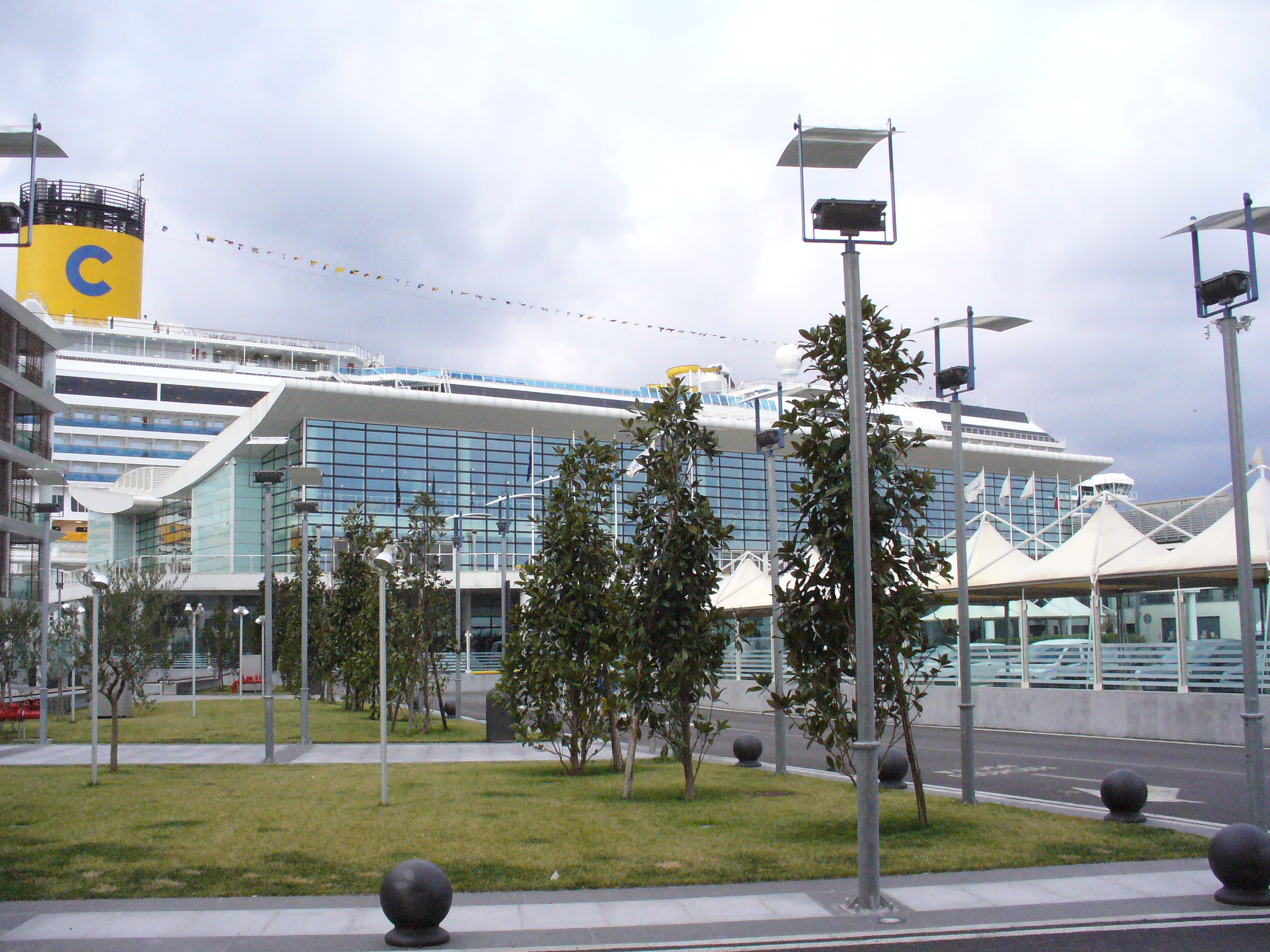 Il Palacrocere (o Stazione Marittima) di Savona con attraccata la nave Costa Concordia della Costa Crociere, Savona - Liguria (Italy) Information about Costa Concordia may be found at IMO 9320544. A ship can change her name and flag state through time, but the IMO number remains the same through the hull's entire lifetime. Therefore, it's useful to identify a ship through her IMO number.